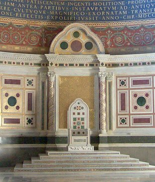 Pope's chair, Basilica di San Giovanni in Laterano, Roma, Italy